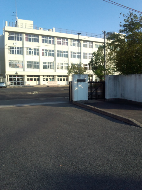 折立中学校正門